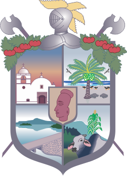 Escudo de armas del Municipio de Tomatlán, Jalisco